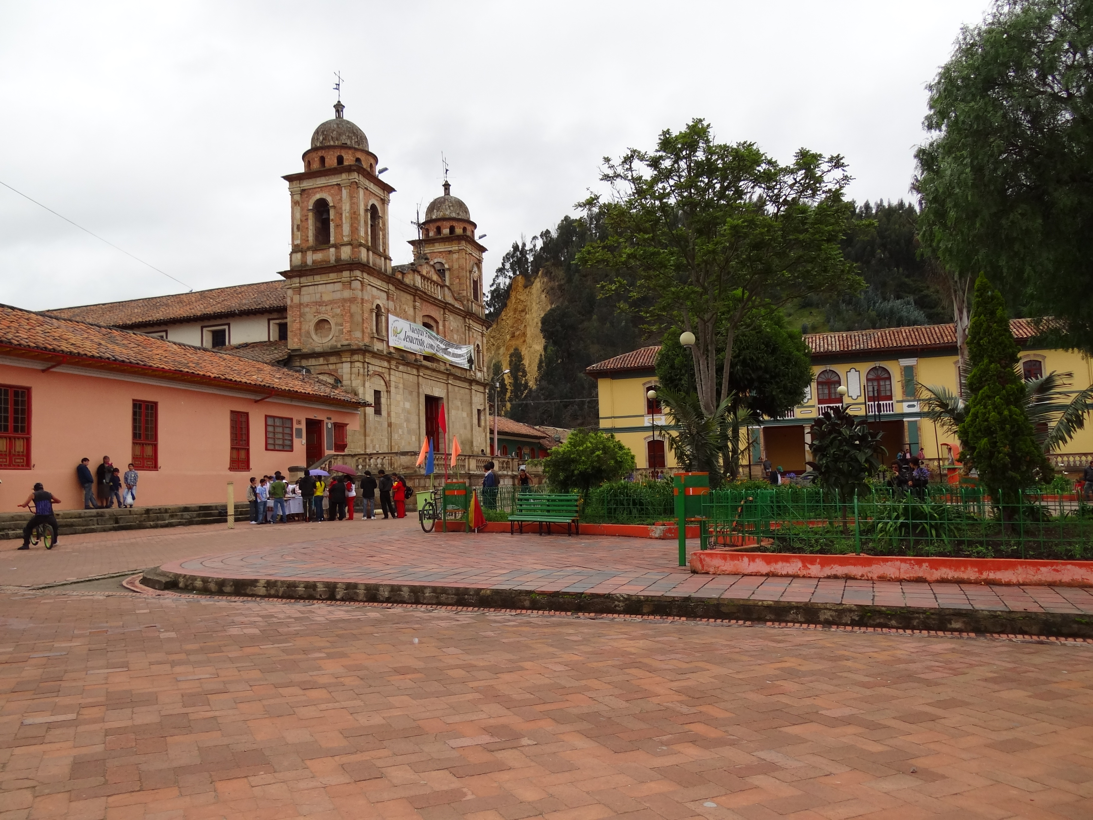 Parque principal, Nemocón, Cundinamarca, Colombia